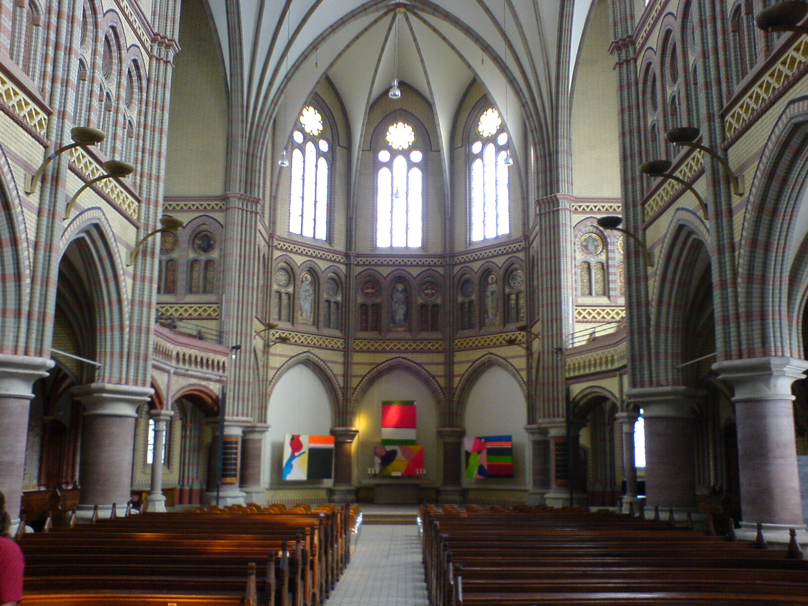 Bildbeschreibung: Altar der St.-Johannis-Kirche in Hamburg-Altona Fotograf/Zeichner: PodracerHH 21:58, 18. Jun 2006 (CEST) Datum: 062006 Sonstiges: ...